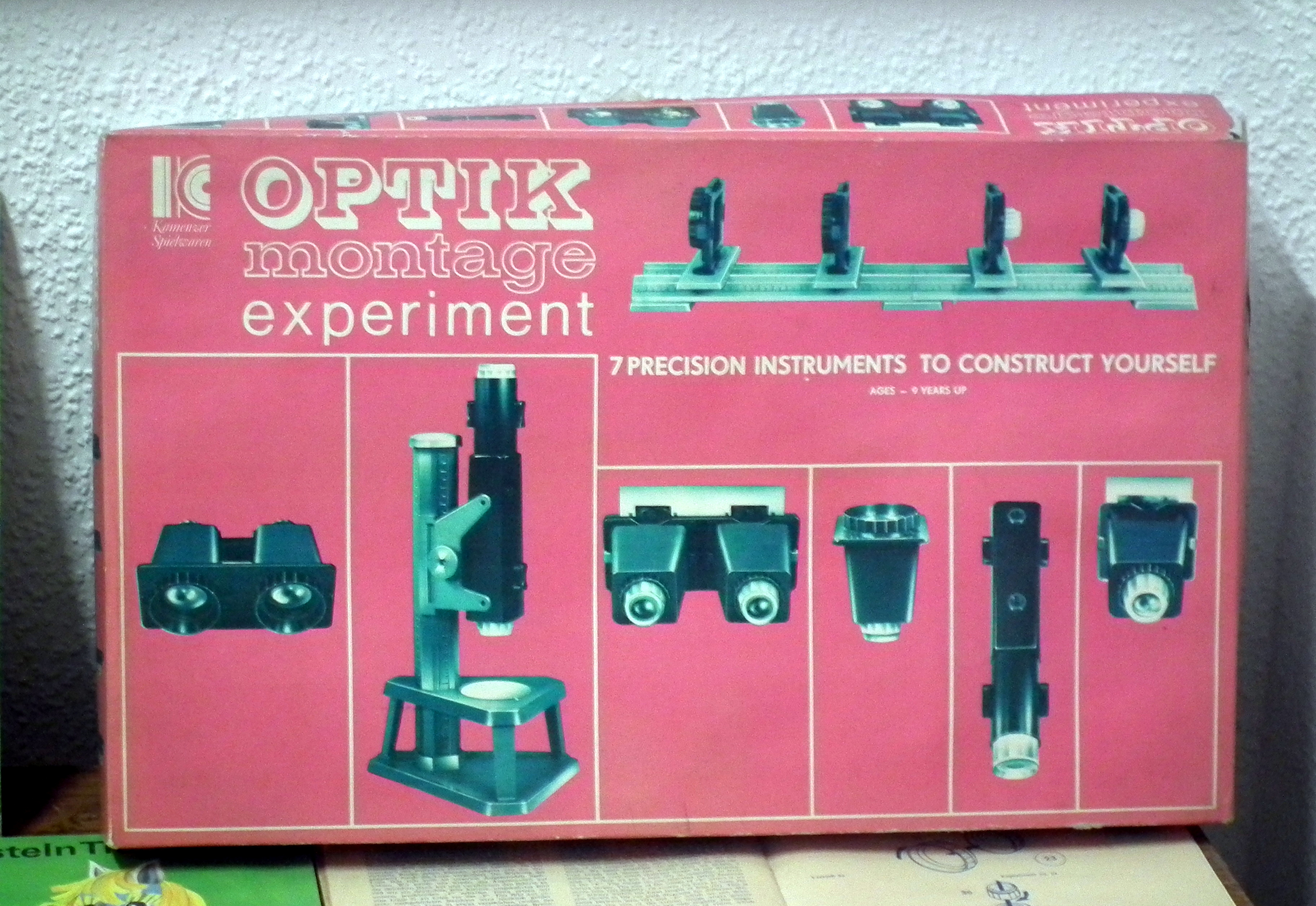 VEB Kamenzer Spielwaren Optik montage experiment, DDR-Museum Pirna, Veröffentlicht mit Genehmigung der Museumsleitung